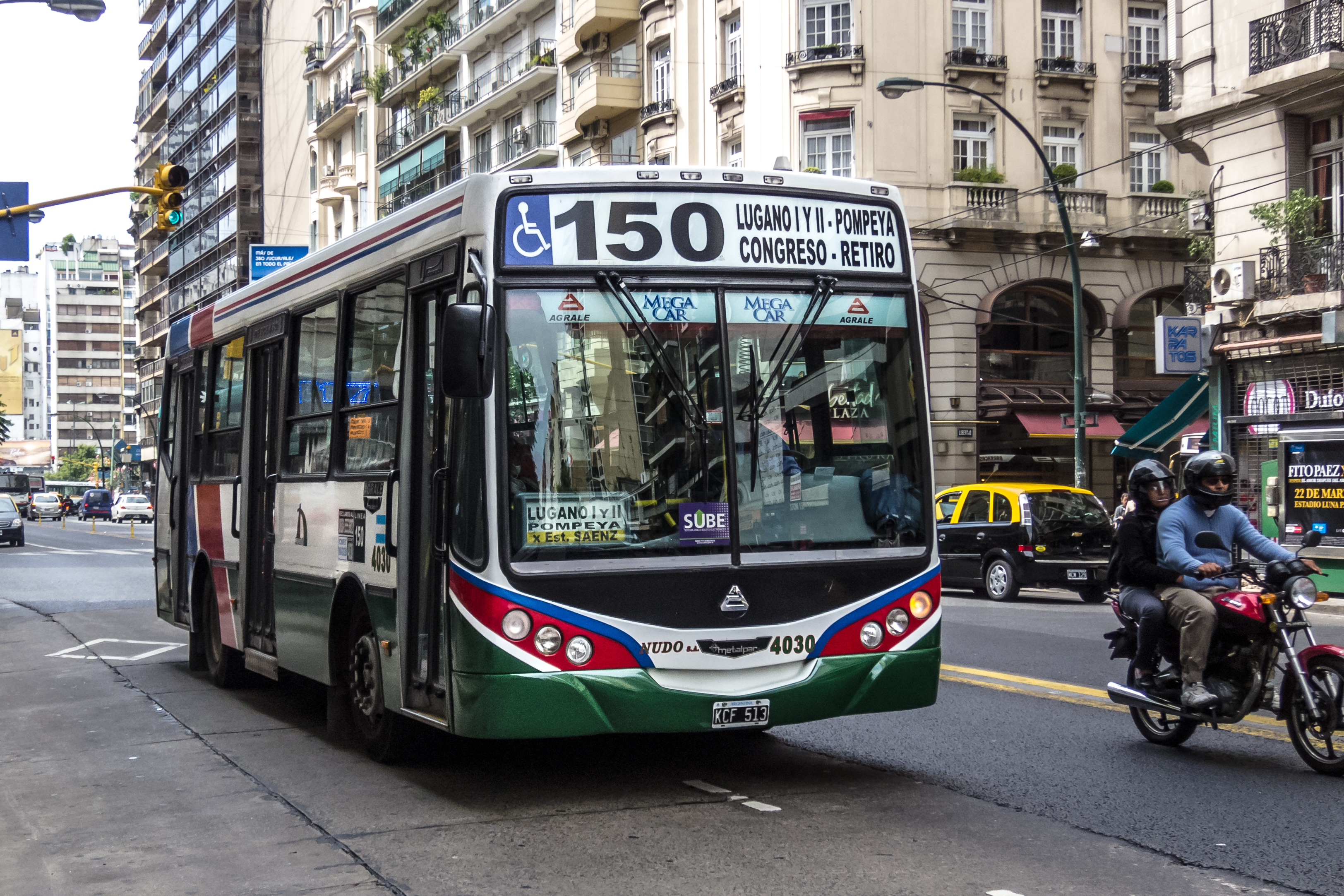 Colectivo de la Línea 150, interno 4030, carrocería Metalpar Iguazú, chasis Agrale, matrícula KCF513. Buenos Aires, Argentina.